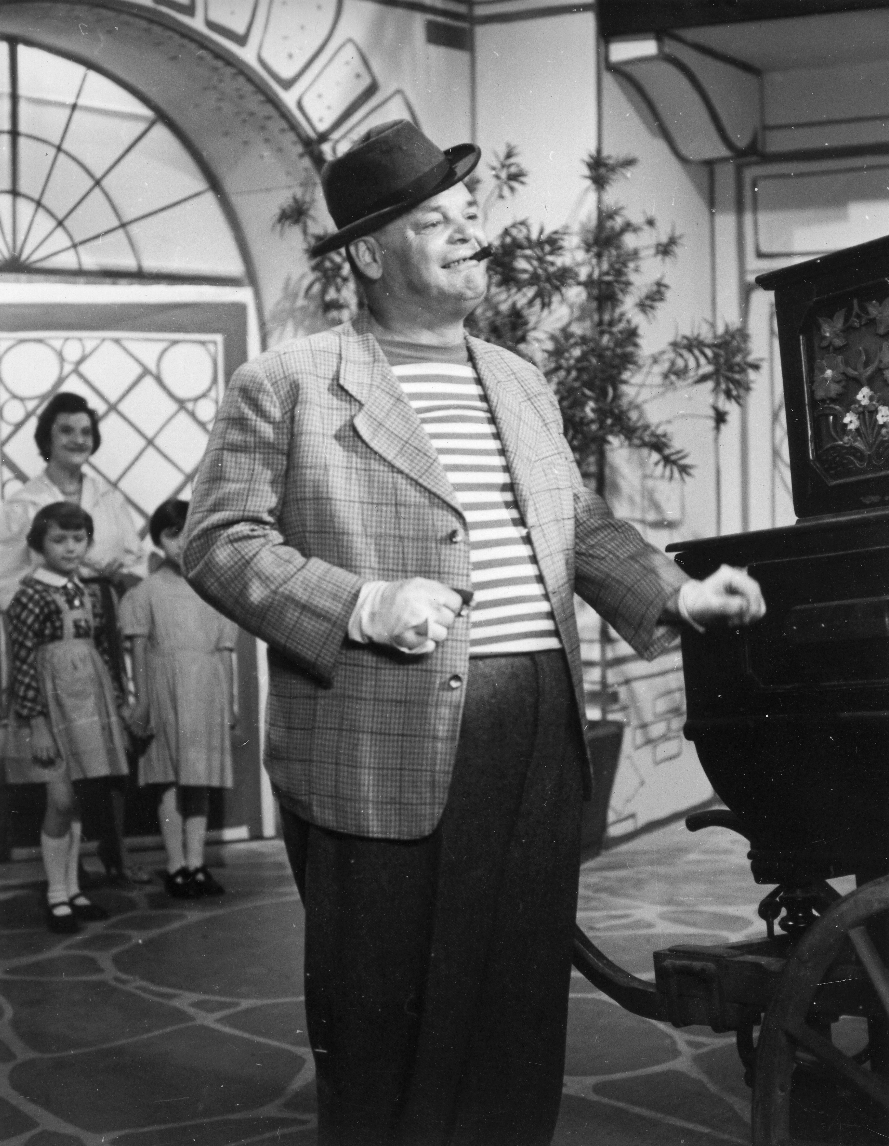 Kazal László színművész. Location: Hungary Tags: celebrity, actor Title: Kazal László színművész.